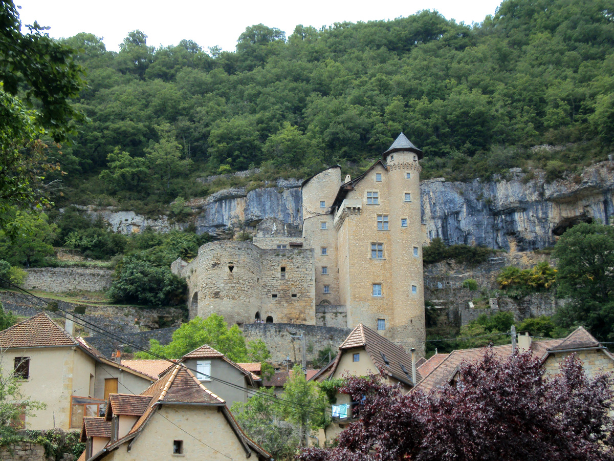 Le château médiéval de Larroque-Toirac - Département du Lot (46) - France - Juin 2011 - Photo 01 Ænglisc: The medieval castle of Larroque-Toirac in the Lot department (46) - France - June 2011 - Photo 01